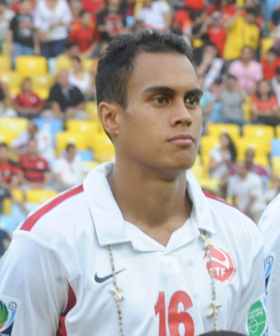 Ricky Aitamai